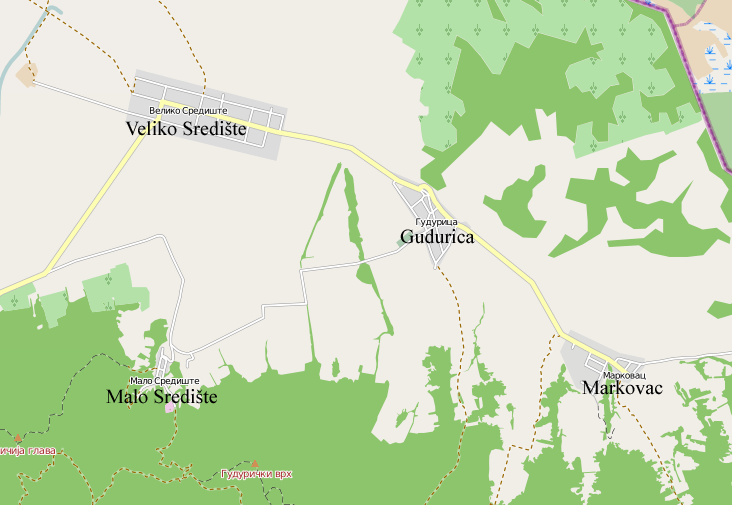 Mapa Gudurice, Velikog Središta, Malog Središta i Markovca.